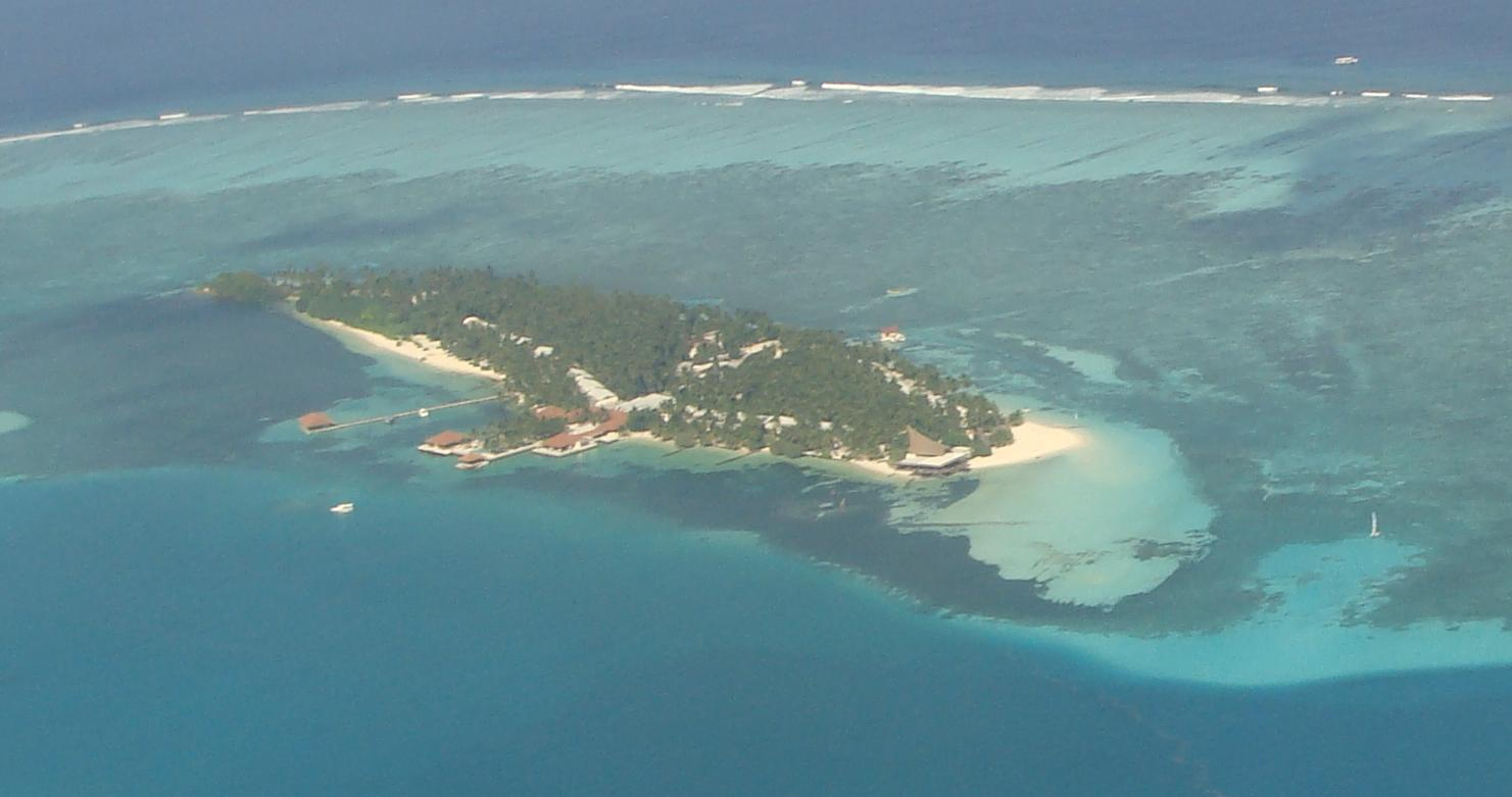 Farukolhufushi Island